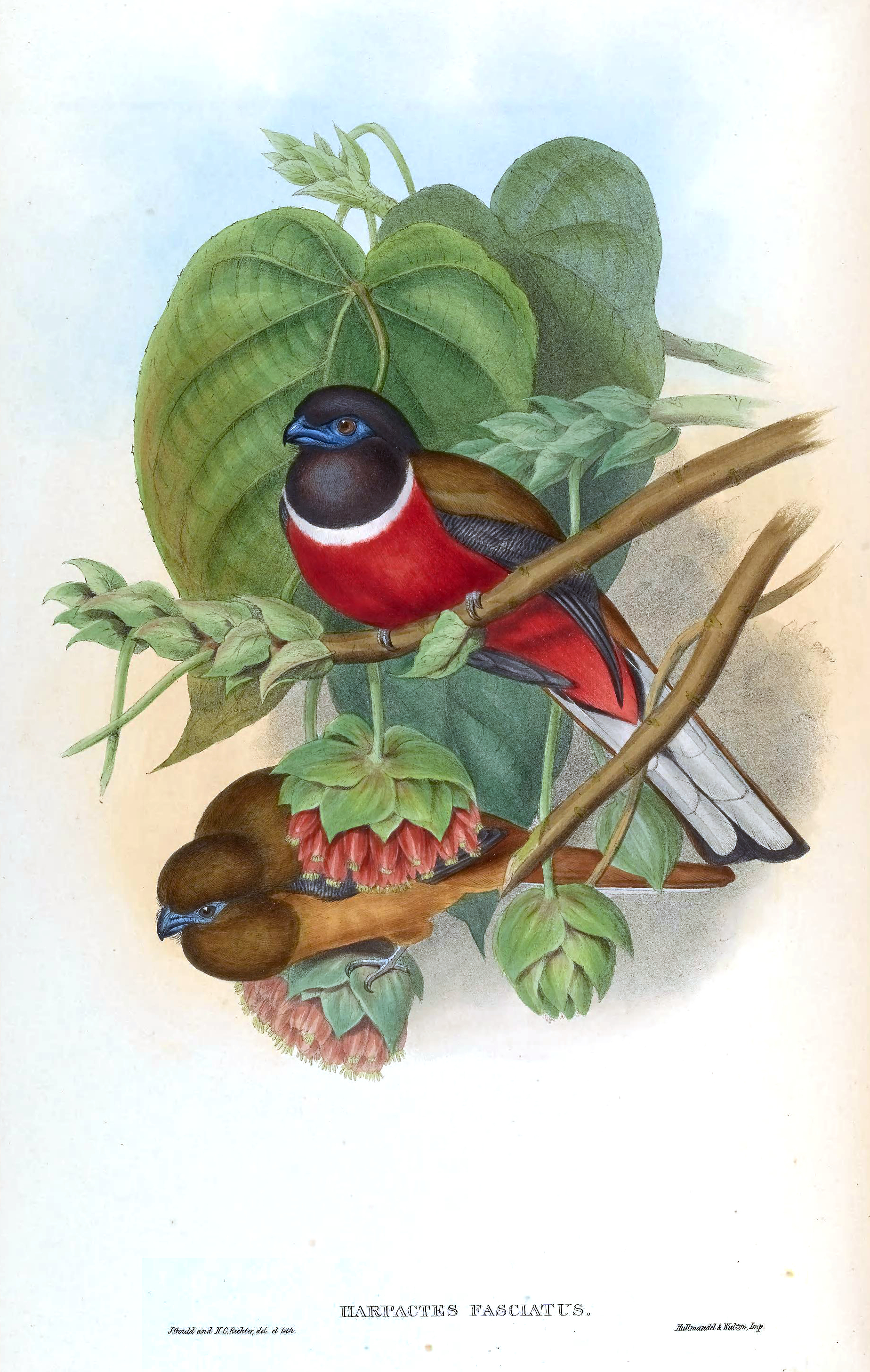 Malabar Trogon Harpactes fasciatus (Pennant)